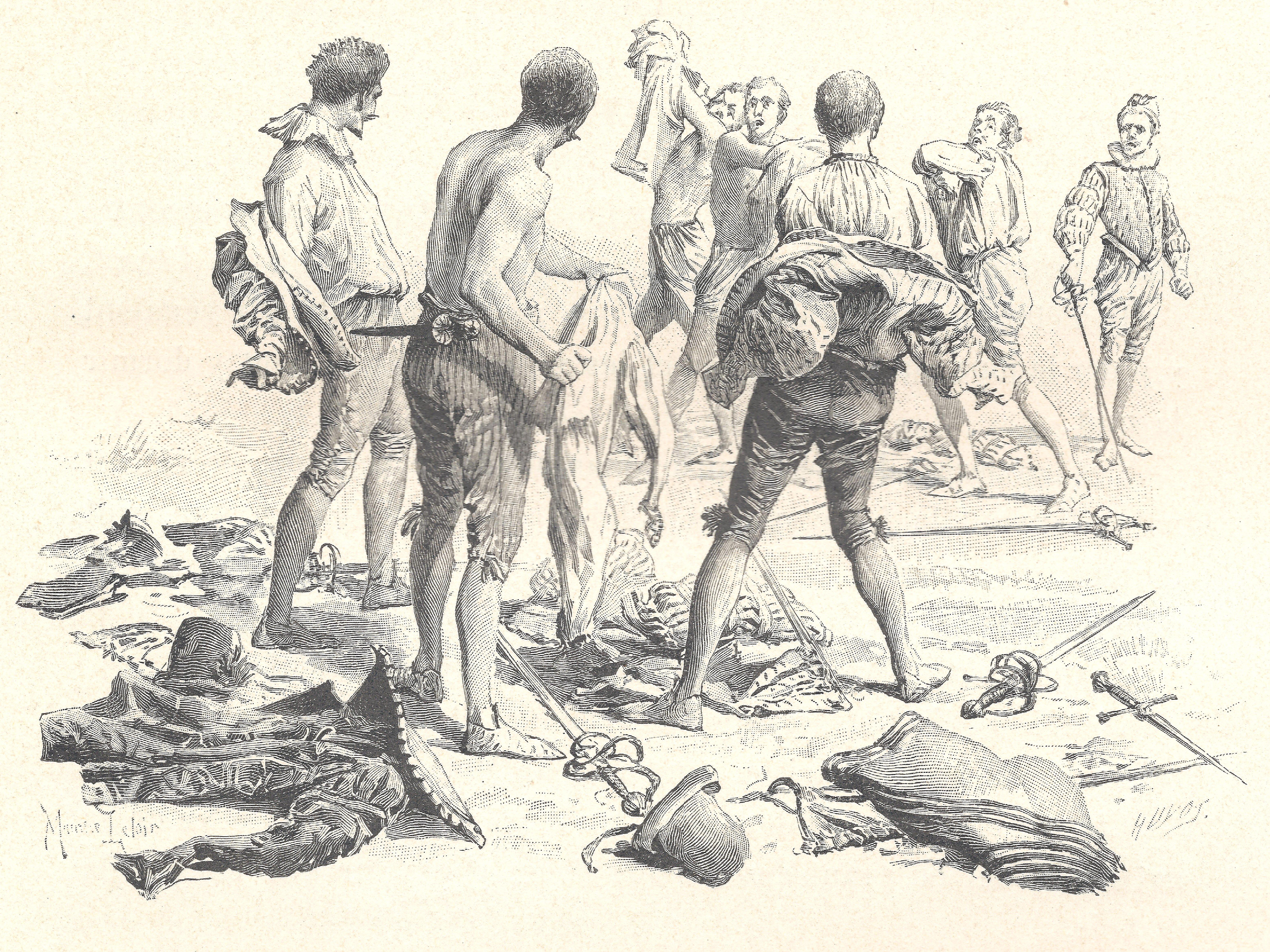 composition de Maurice Leloir et gravure sur bois de Jules Huyot se trouvant p.461 : Les jeunes gens jetèrent leurs pourpoints et arrachèrent leurs chemises.